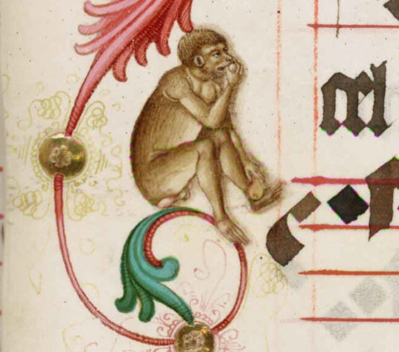 Graduál loucký (1499), strana 336, obrázek opice. Vědecká knihovna v Olomouci, signatura M IV 1